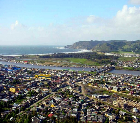 Lebu, Capital de La Provincia de Arauco. Chile